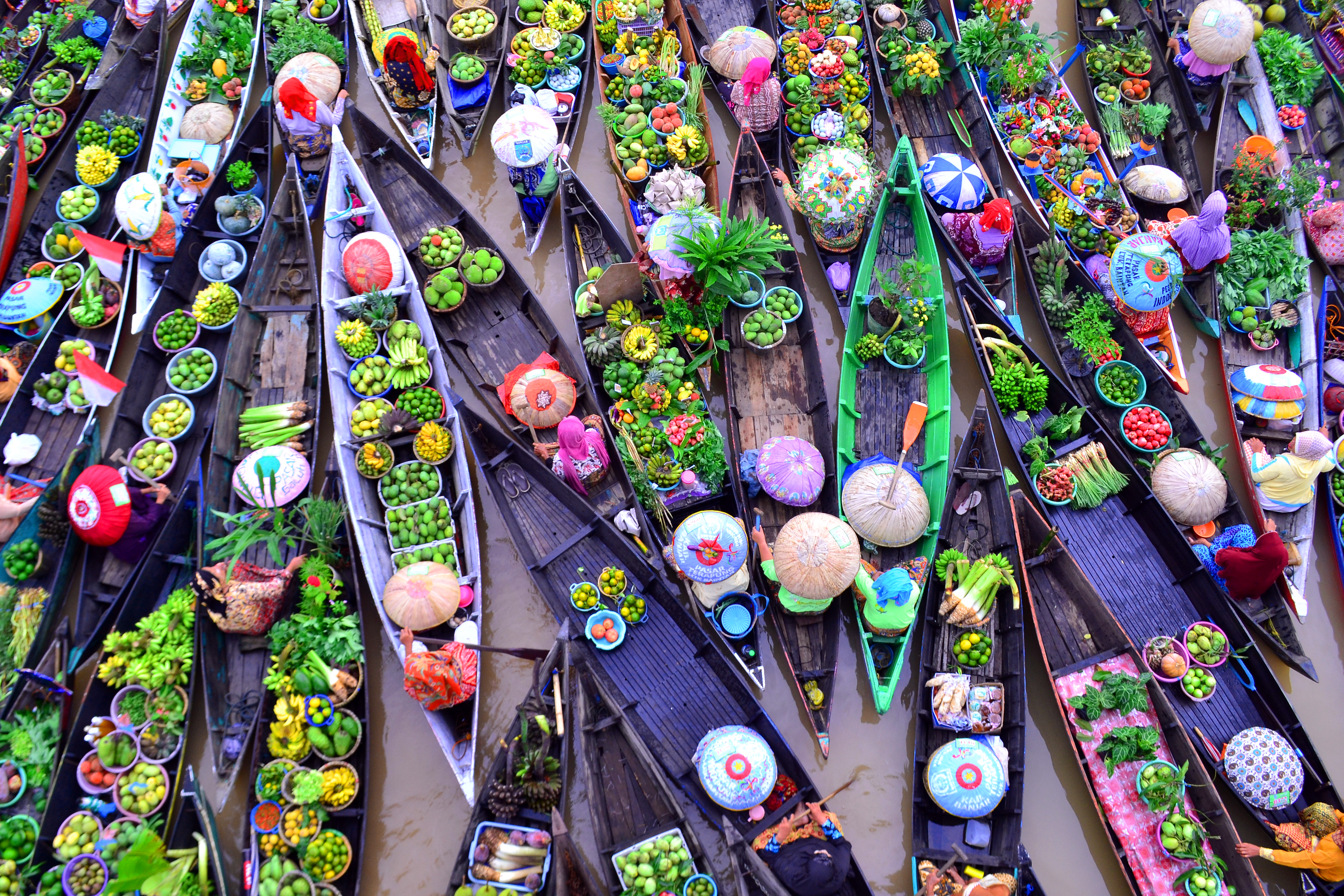 di daerah desa Lokbaintan yaitu tepatnya lokasi pasar terapung ciri khas dari kota Banjarmasin, kalimantan selatan pedagang menjual melalui jalur sungai dengan berbagai macam dari buah-buahan, sayuran, tanaman sampai ternak juga ada.